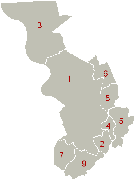 Districtenkaart, eigen werk Nummering Antwerpen Berchem Berendrecht-Zandvliet-Lillo Borgerhout Deurne Ekeren Hoboken Merksem Wilrijk.